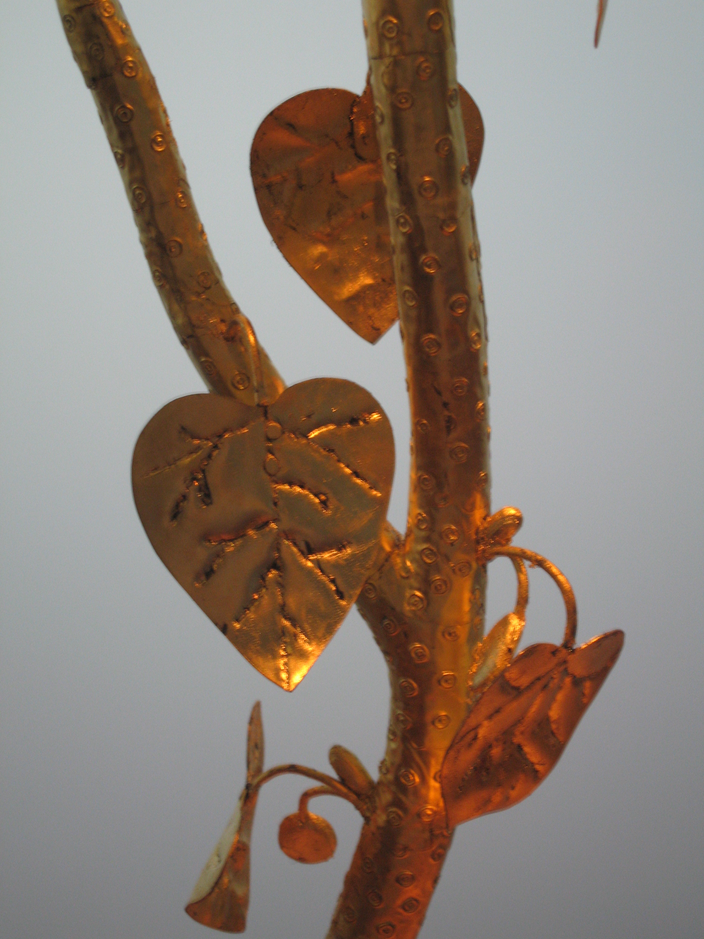 Kultbäumchen aus Manching